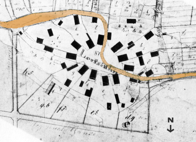 Flurkarte Lensian